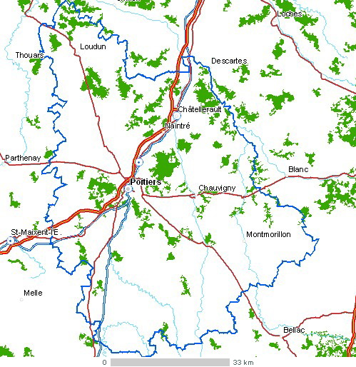 Carte du département Vienne Légende